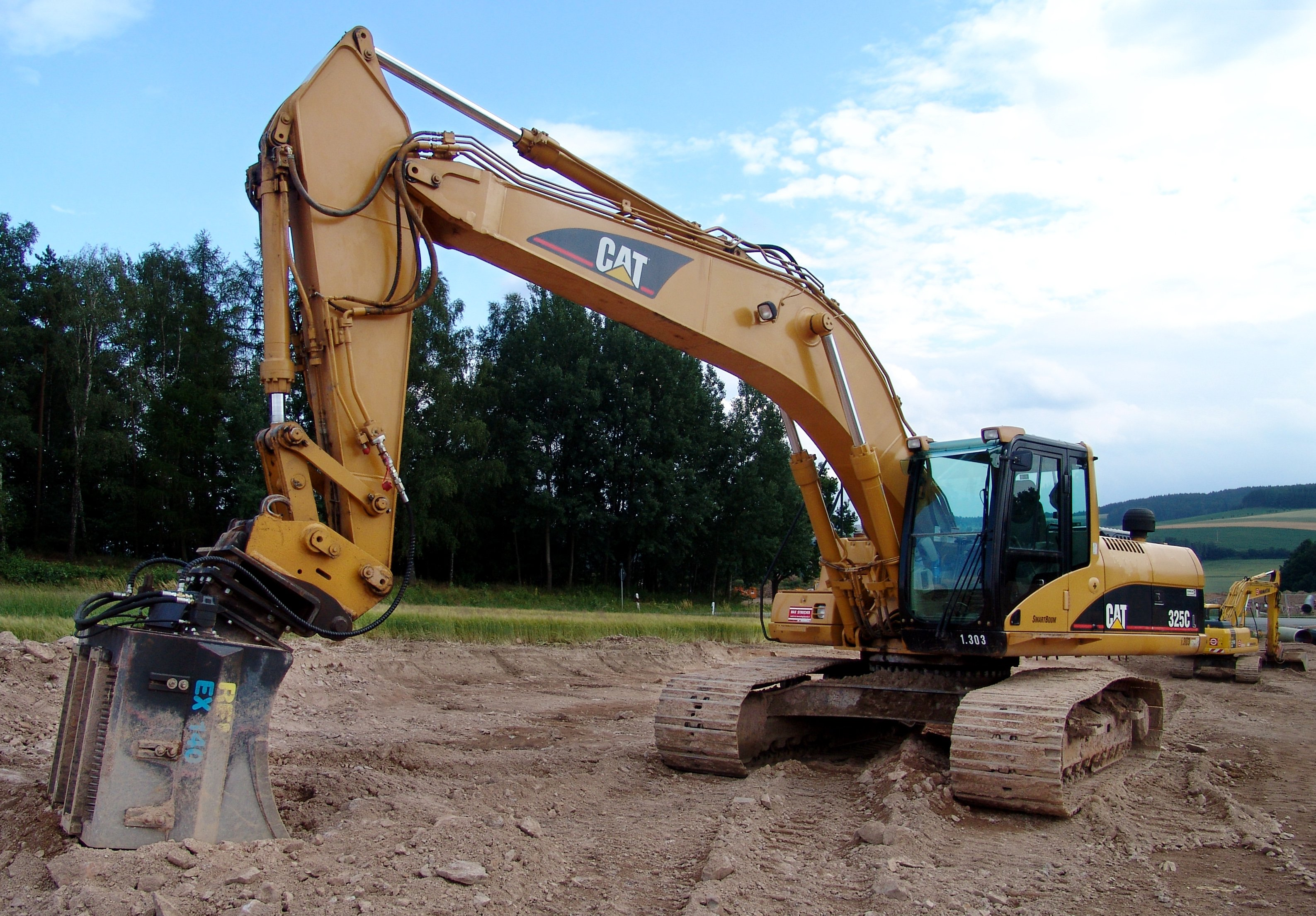 Caterpillar 325C mit Sieb-, Schredderlöffel